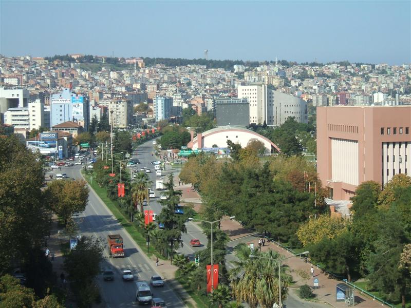 Samsun Atatürk Bulvarı